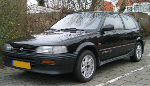 Zelfgemaakte foto door up-loader van eigen auto